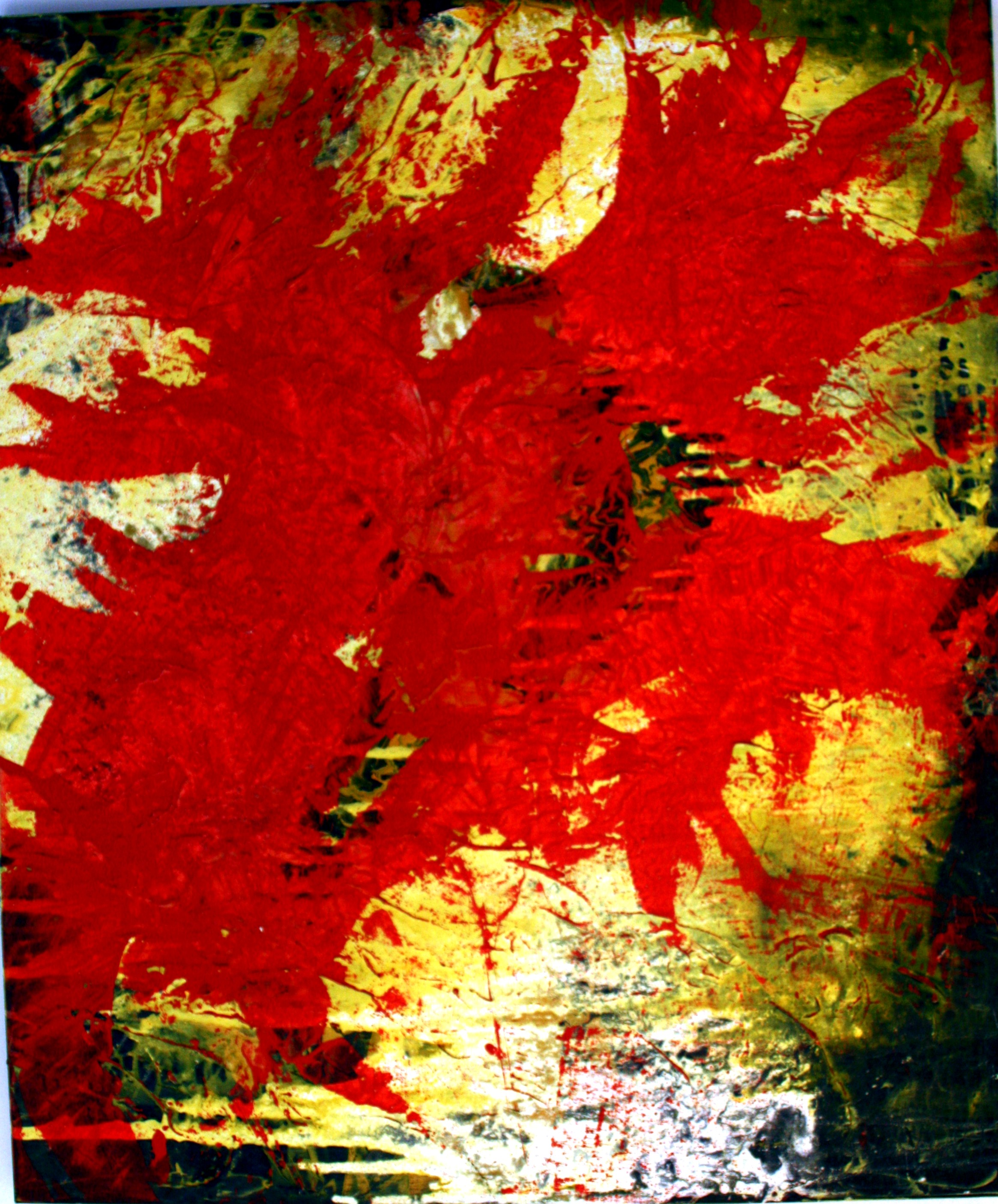 rotes Blatt, weiß, schwarzgrün Mischtechnik auf Leinwand 100 cm x 120 cm